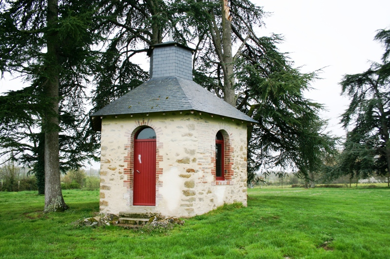 Français